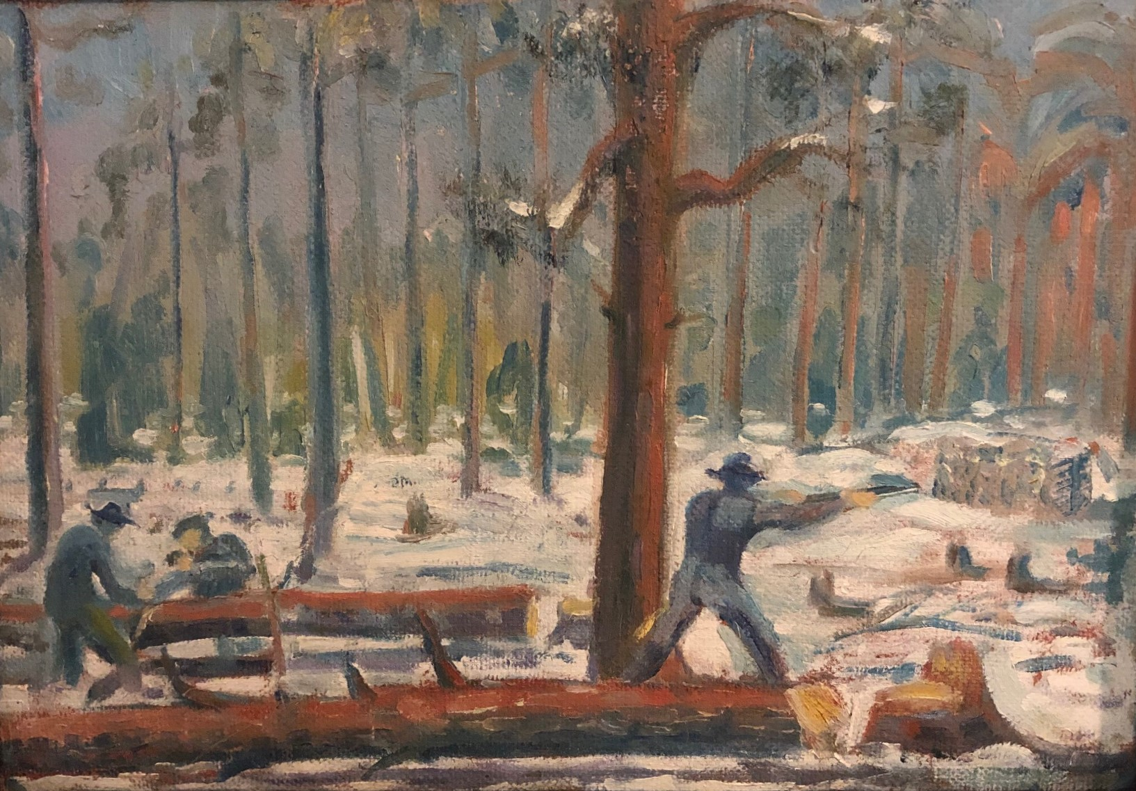 Tavla målad av Ernst Sjöstedt